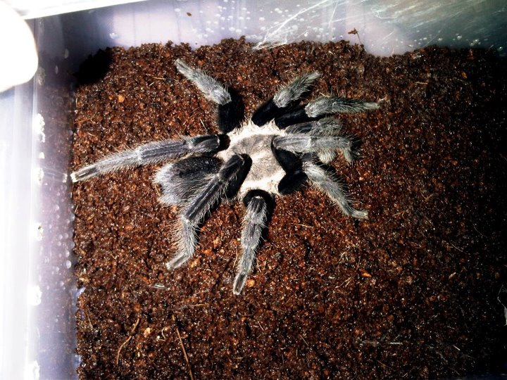 Selenocosmia javanensis sumatrana